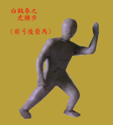 白鶴拳虎腰步